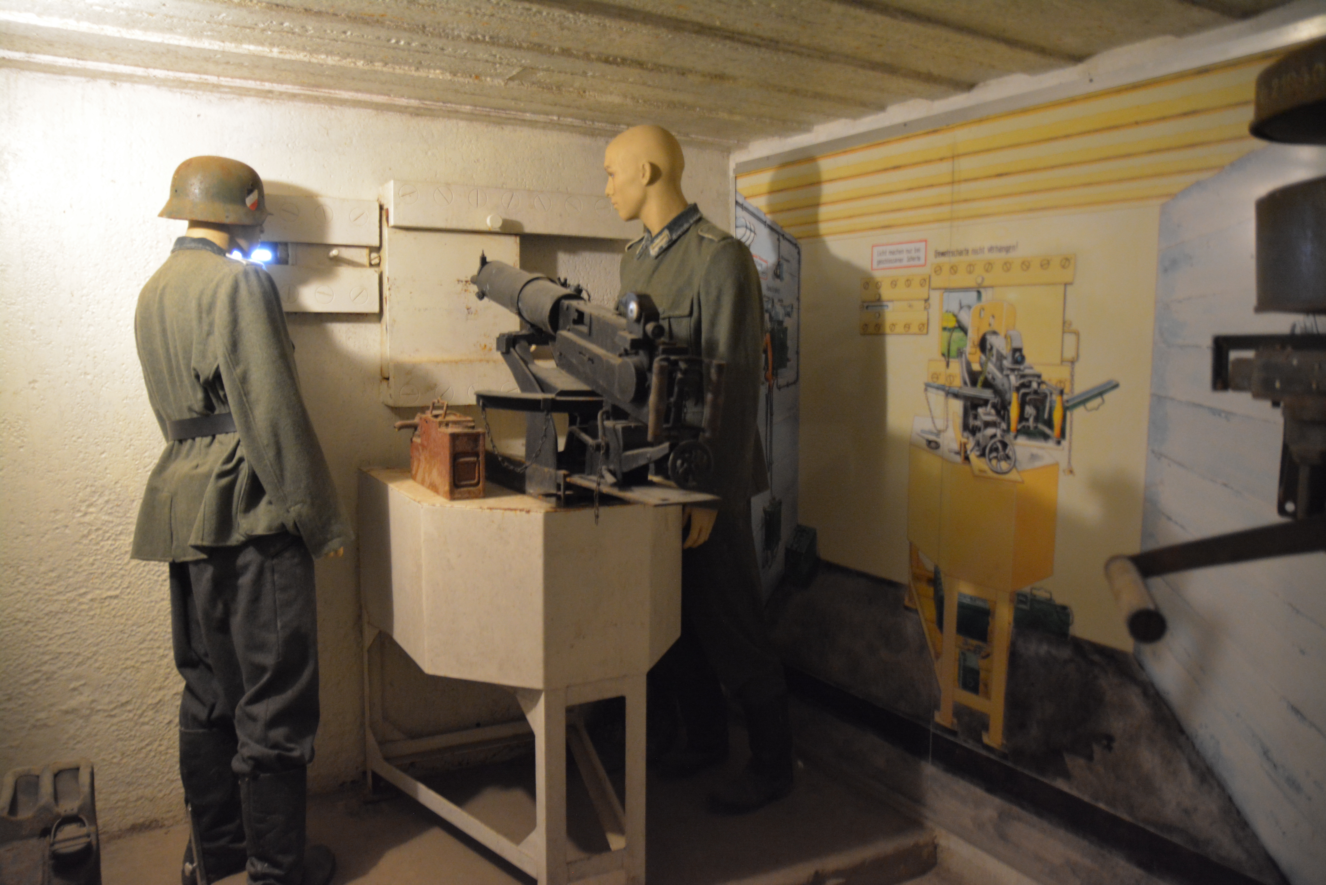 MRU - Muzeum Fortyfikacji i Nietoperzy w Pniewie